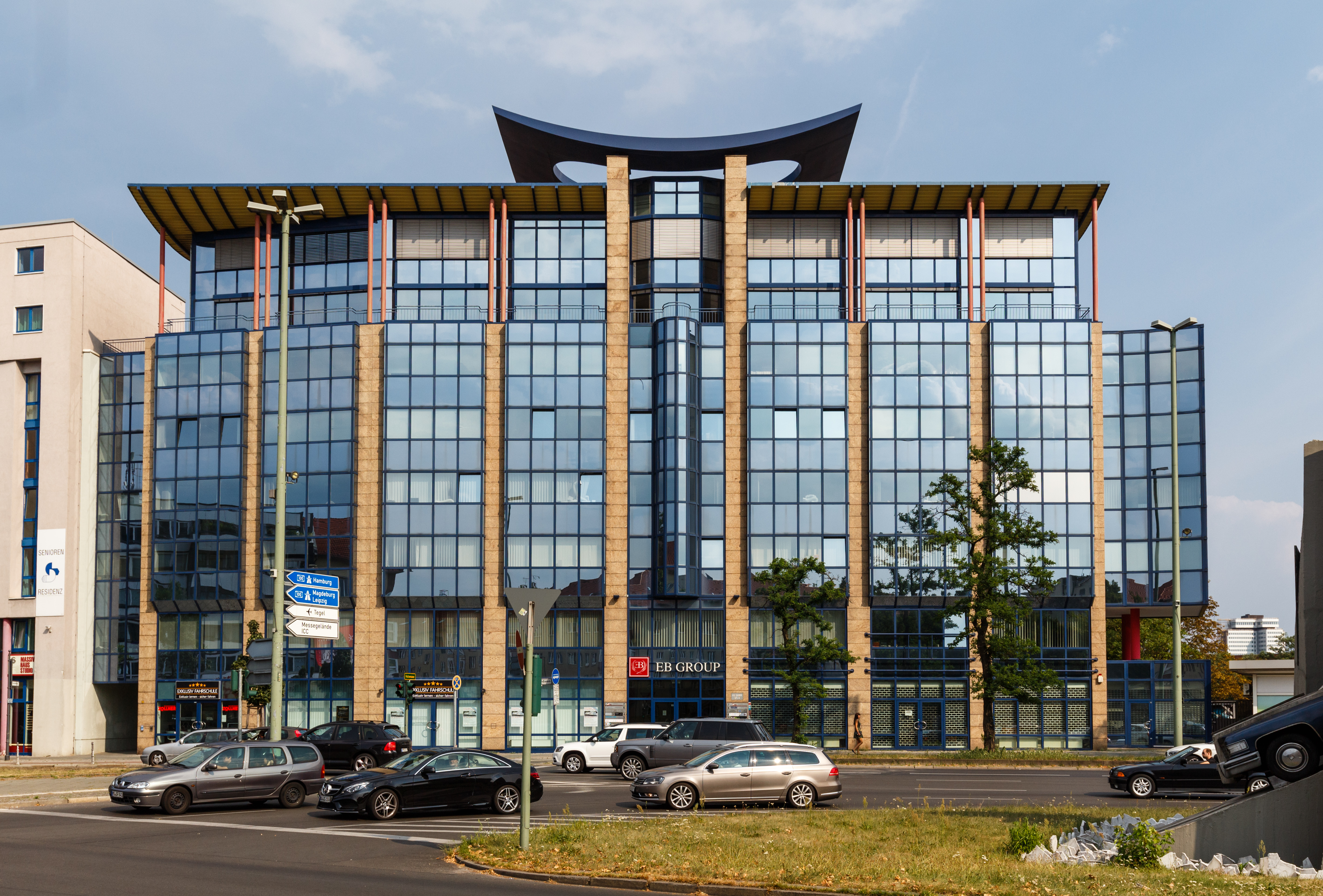 Geschäftshaus Kurfürstendamm 125a. Während sich das Gebäude noch in Halensee befindet, gehört das Straßenland vor dem Gebäude bereits in Grunewald am Rathenauplatz.